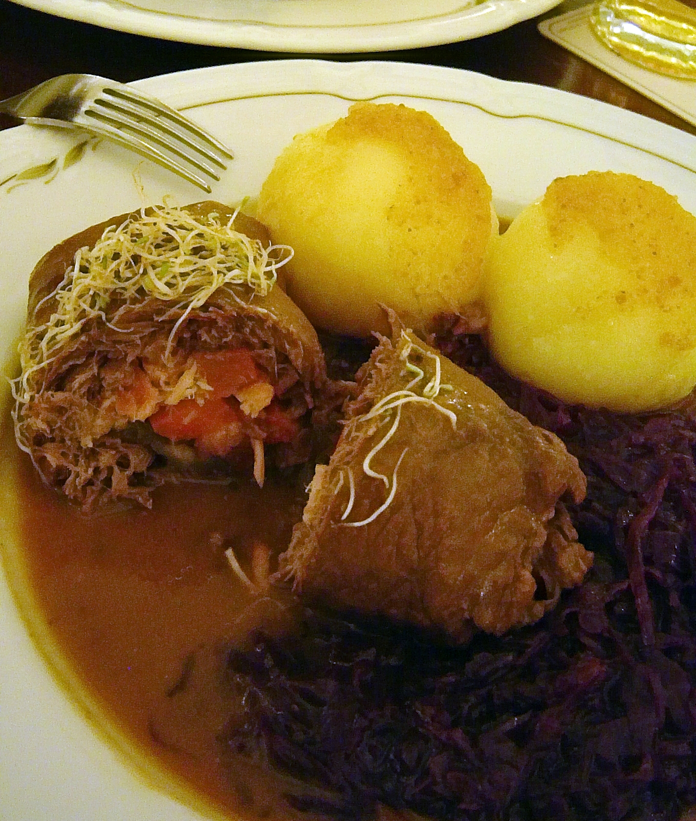 Klassisches Rouladengericht (mit einer gefüllten Rindsroulade sowie mit Apfelrotkohl und Kartoffelklößen) in der Traditionsgaststätte Auerbachs Keller in Leipzig, Deutschland. Beschreibung gemäß Speisekarte: Hausgemachte Rindsroulade, gefüllt mit Karotte, Gewürzgurke, Speck und Kasseler, mit Apfelrotkohl und Kartoffelklößen.